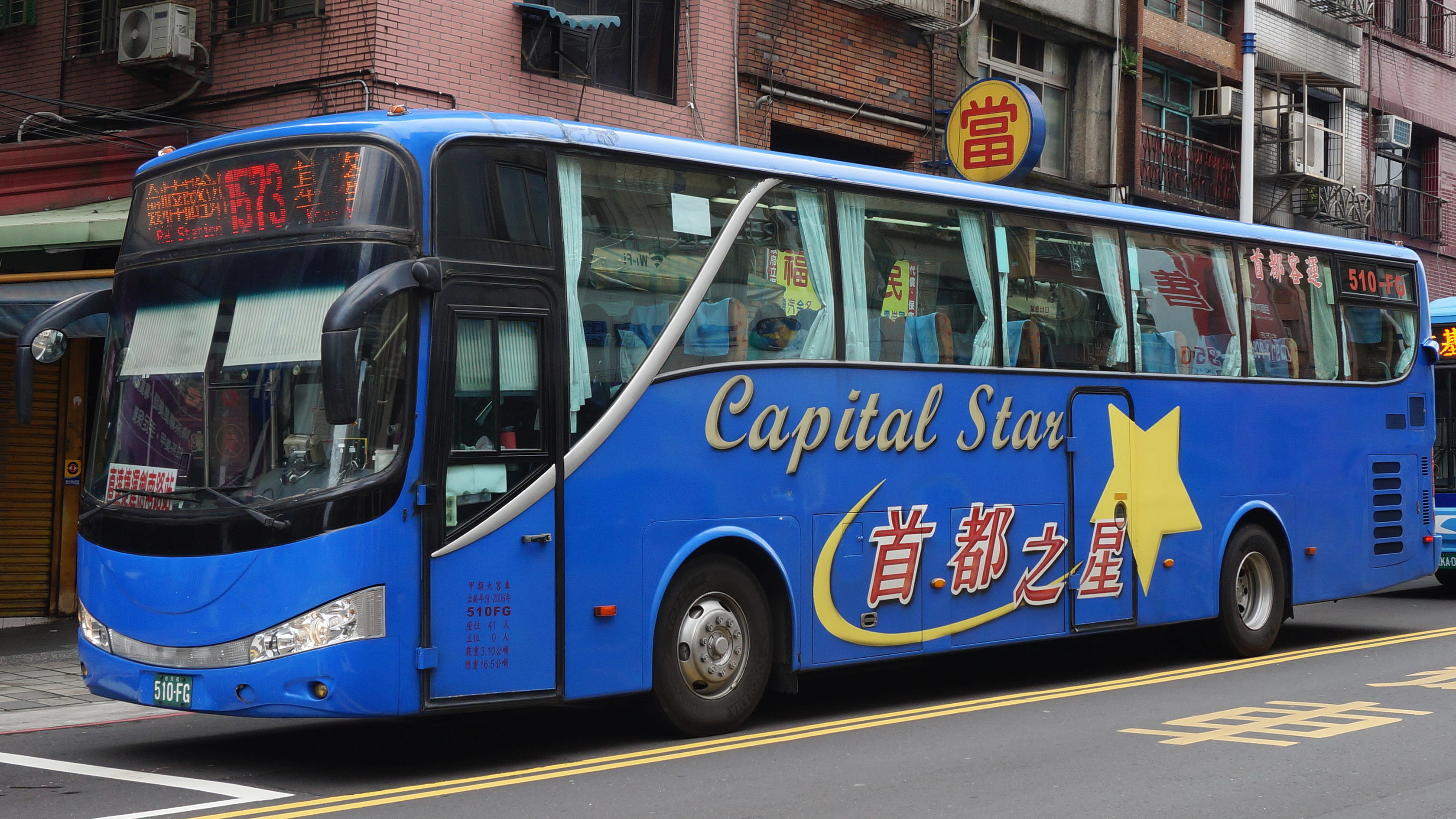 首都客運2006年日野LRM2PSU大客車510-FG行駛1573線。